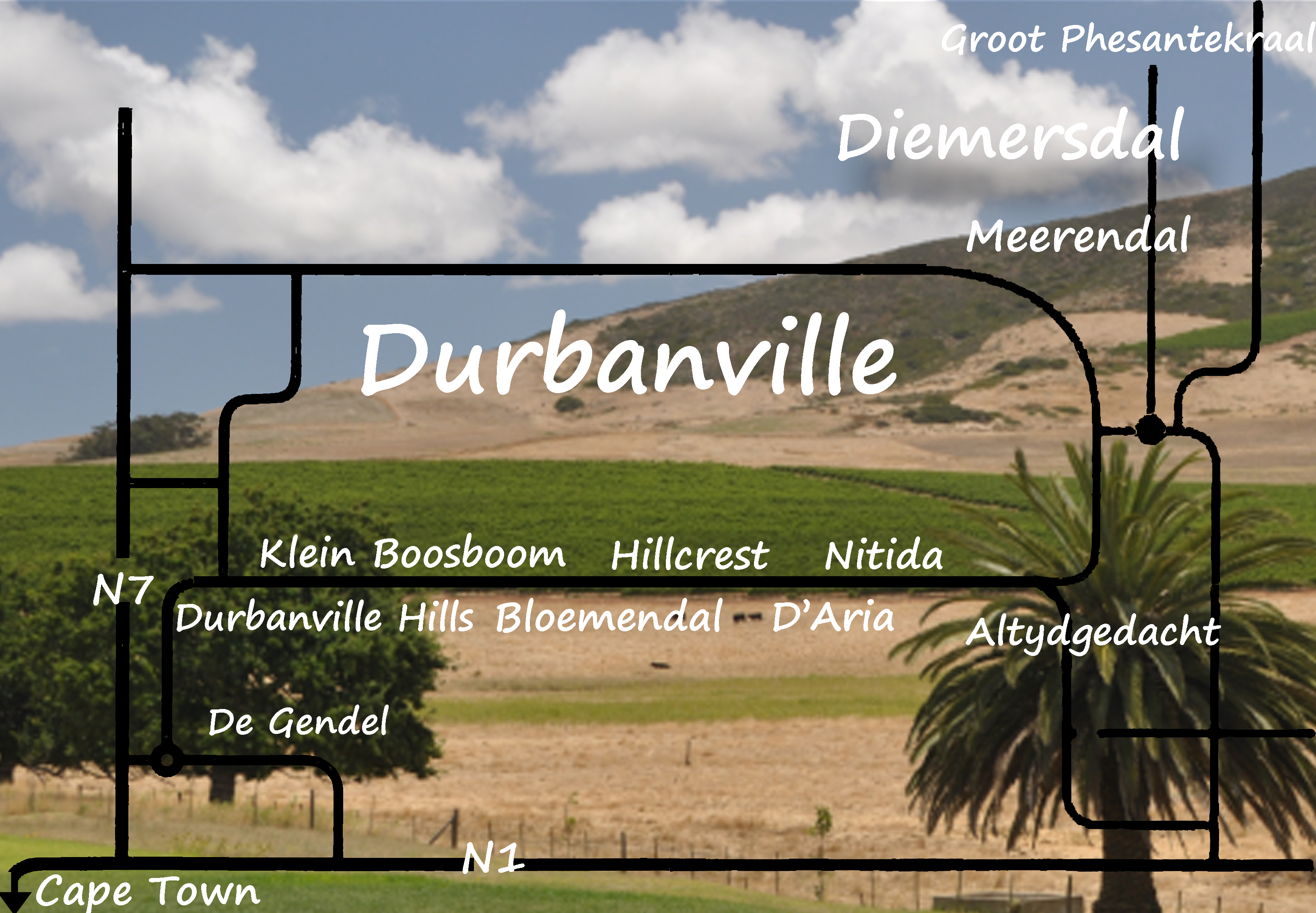 Weinregion Durbanville